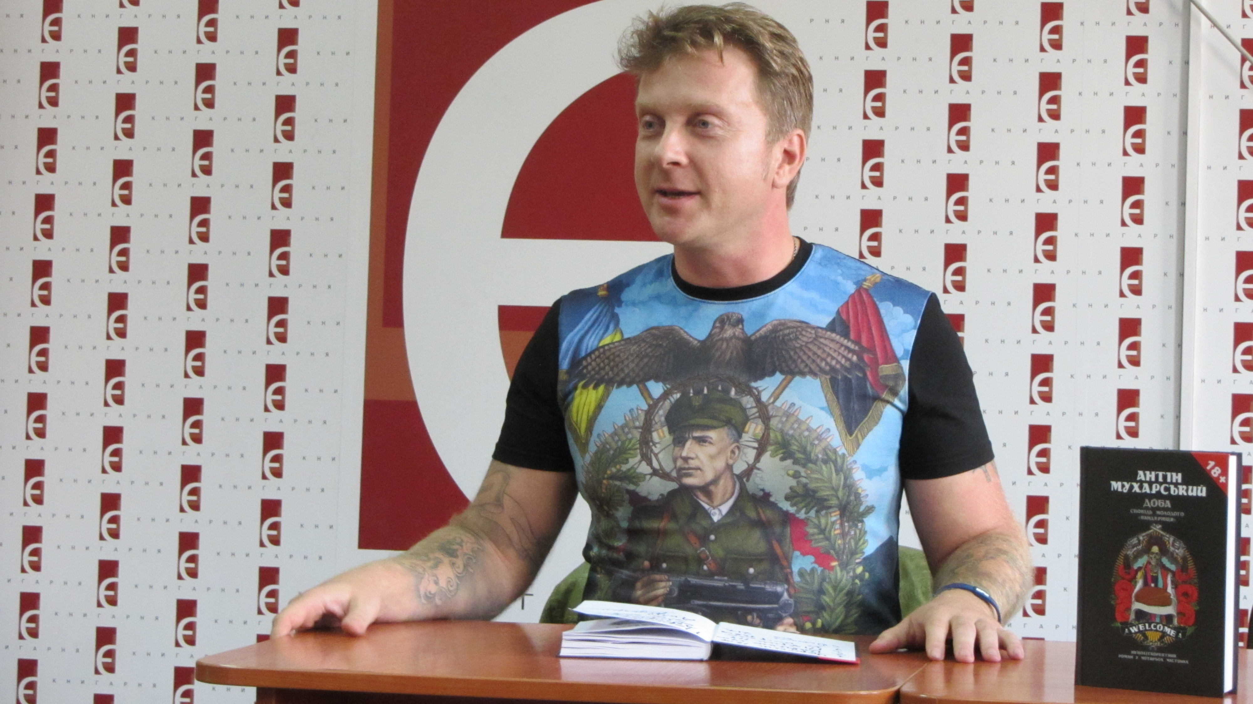 Антон Мухарський на 19 Форумі видавців у Львові 15 вересня 2012 р. Anton Muharskyj - ukrainian actor and writer at 19-th Publishers' Forum / Bookforum in Lviv, September 15, 2012.